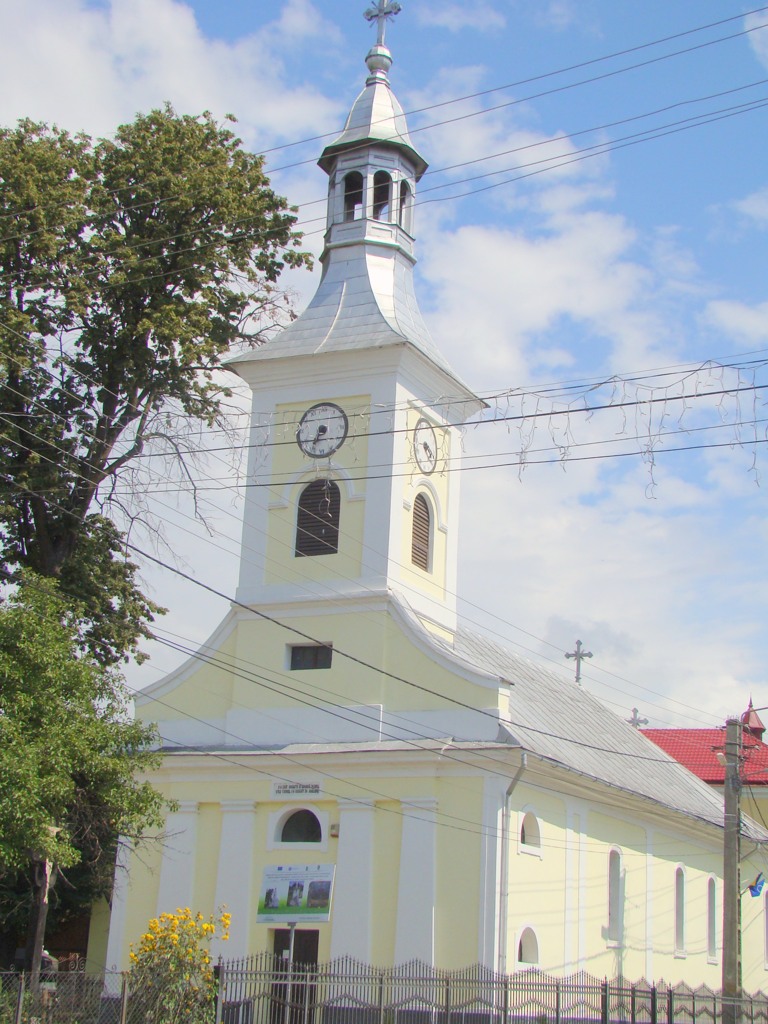 Biserica ortodoxă „Sf. Arhangheli Mihail și Gavriil”, sat Feldru; comuna Feldru